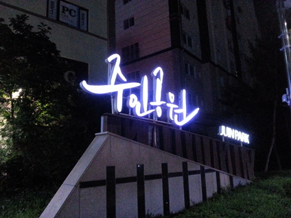 주인공원. 인천 남구 숭의동 55-1